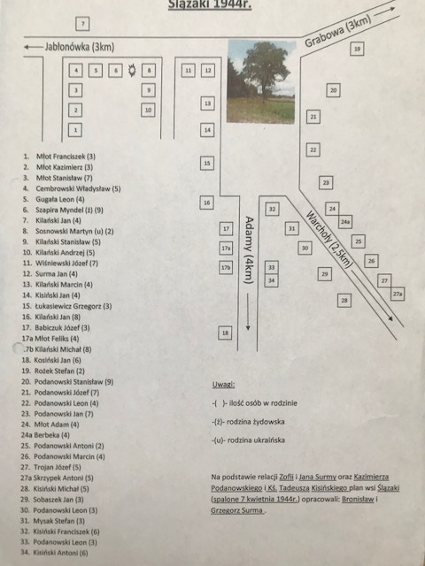 Plan wsi Ślązaki opracowany na podstawie relacji Zofi Surmy, Jana Surmy, Kazimierza Podanowskiego oraz ks. Tadeusza Kicińskiego